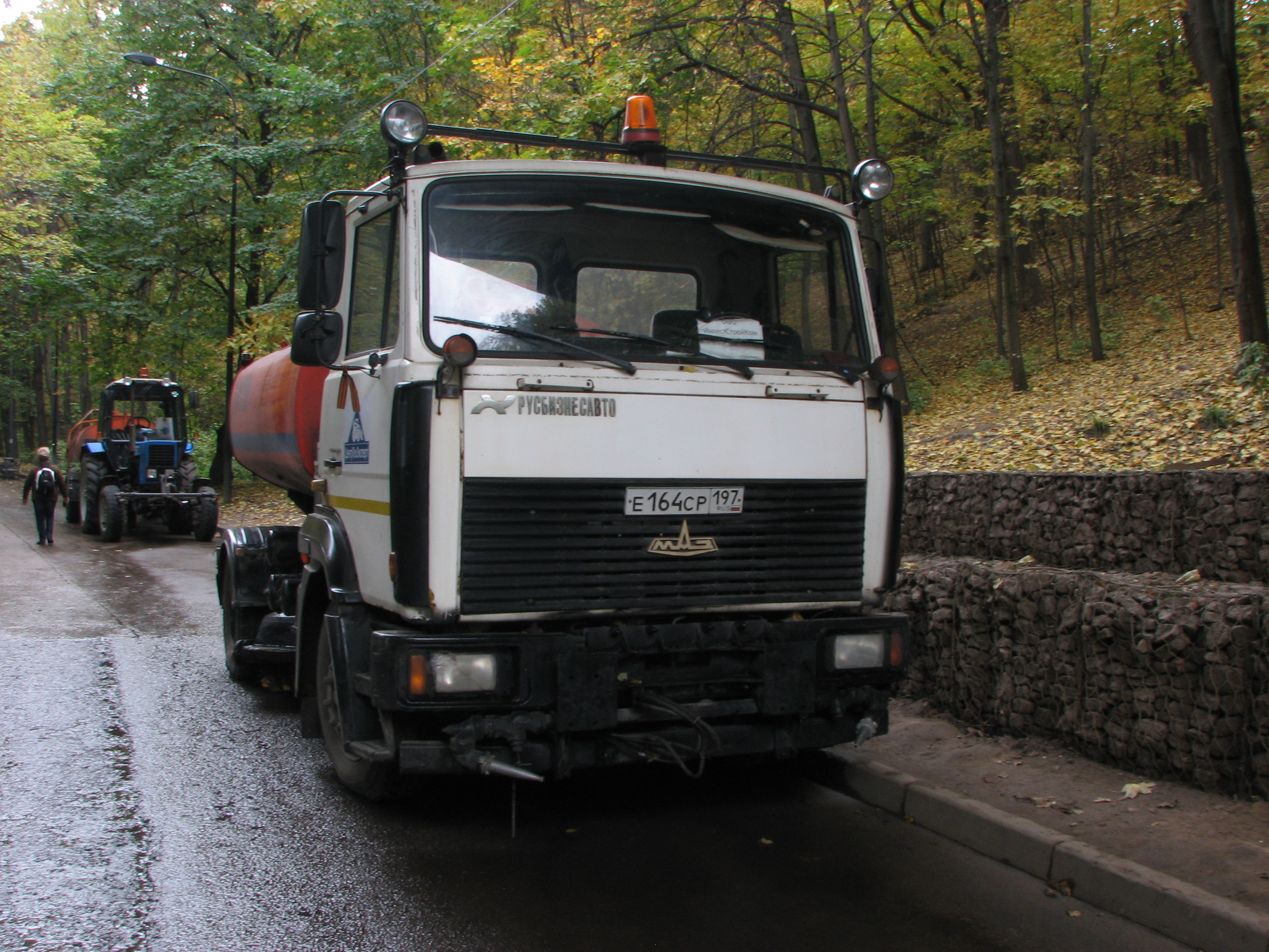 Поливальная машина на шасси МАЗ-4380. Москва, Воробьёвы горы.